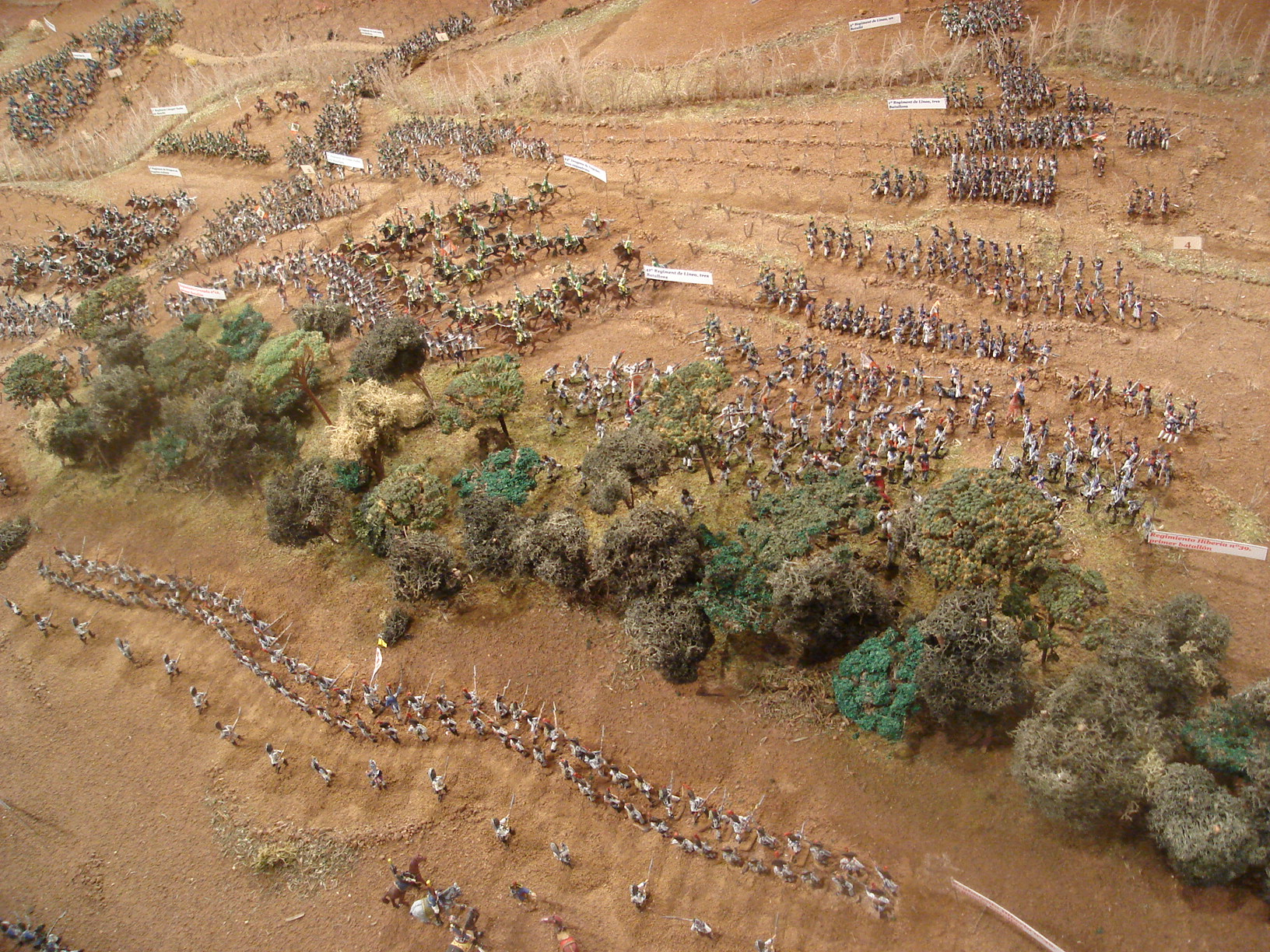 Foto de la maqueta que representa la batalla de Cardedeu, que forma part de l'exposició Batalla de Cardedeu, al museu arxiu Tomàs Balvey de Cardedeu (2009)